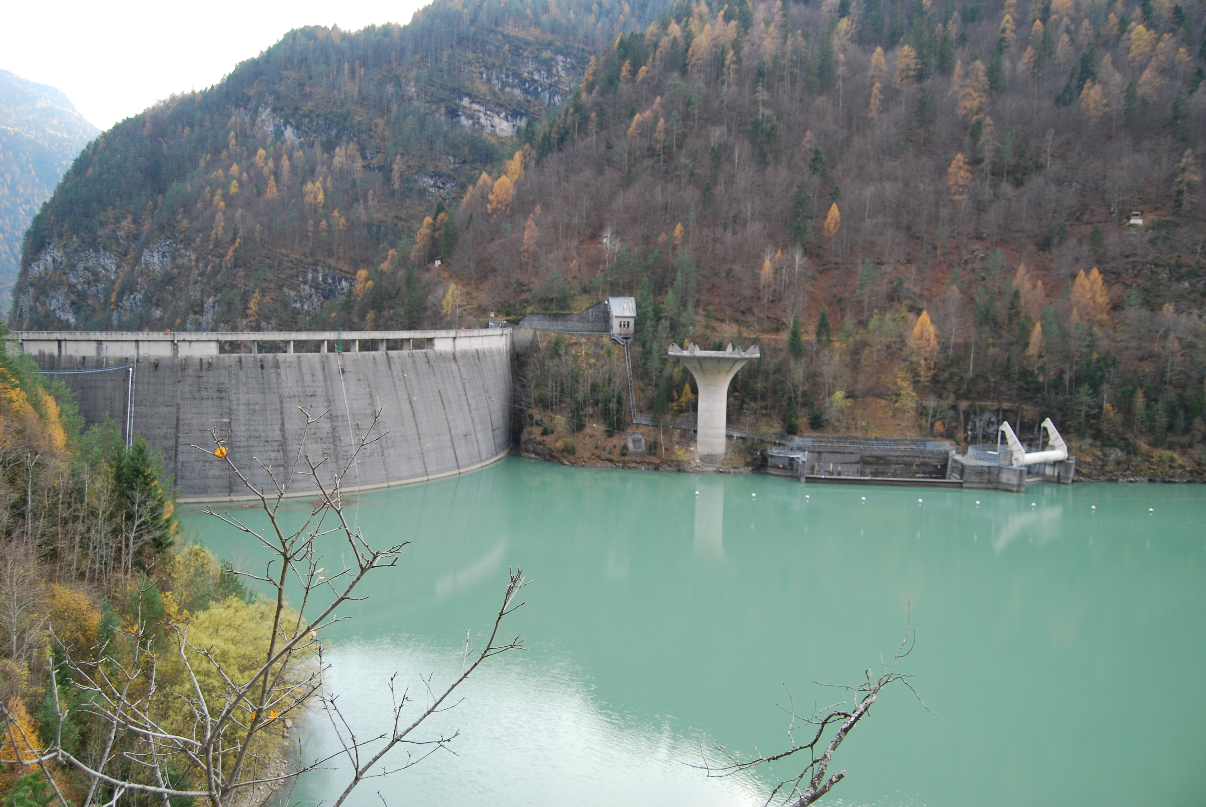 Diga di Pontesei di Zoldo vista da monte. Il livello dell'invaso attuale a quota di sicurezza dopo l'alluvione del novembre 1966. A destra, l'imbuto dell'ex scarico di superfice, a lato la paratoia e il nuovo scarico.